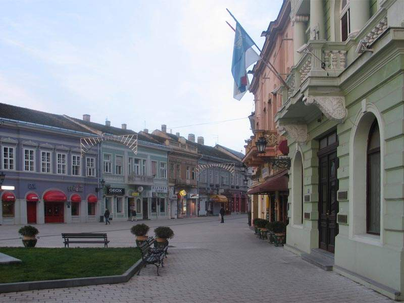 Opis: Dunavska ulica u Novom Sadu Autor: Nenad Seguljev